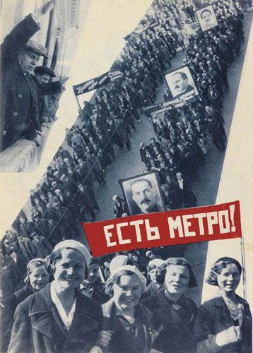 1935. Страница из журнала «СССР на стройке», № 8. Есть метро!.jpg